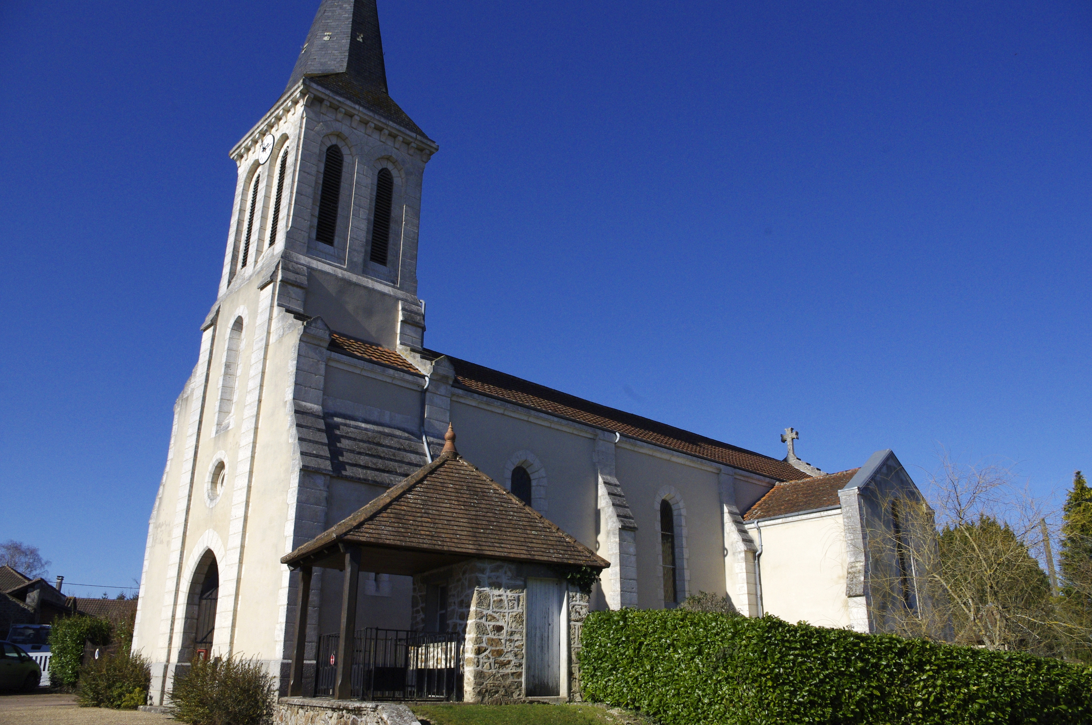 Champs-Romain, Dordogne, l'église